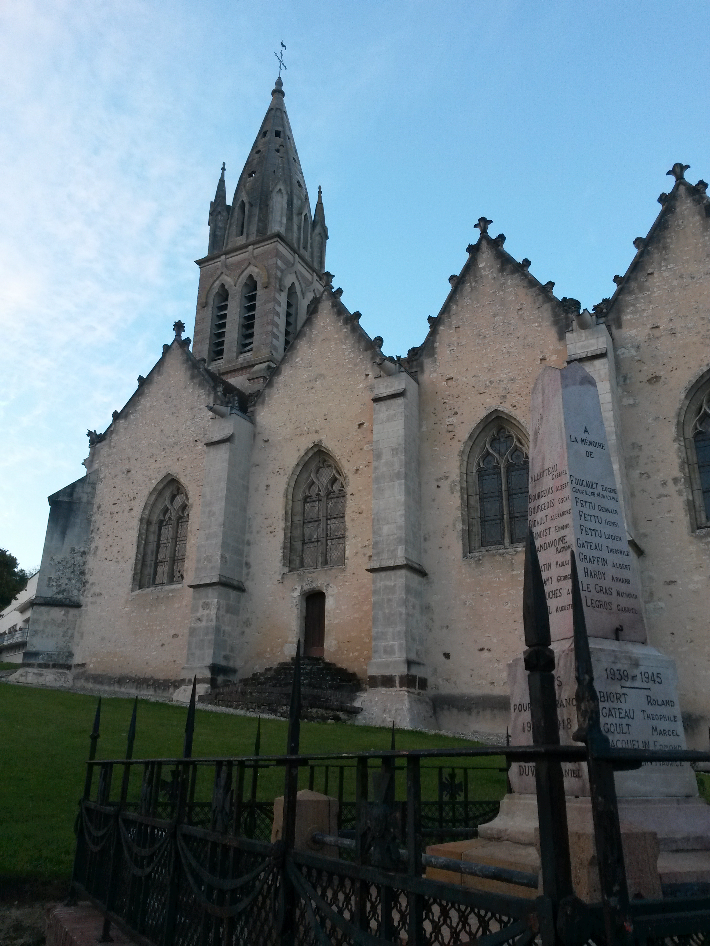 Eglise et monument aux morts de Saint-Victor-de-Buthon